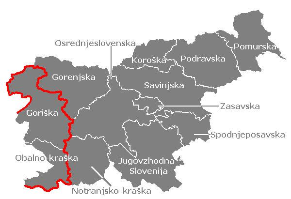 Rielaborazione dell'immagine "Statistical regions of Slovenia.PNG" indicante il Litorale Sloveno